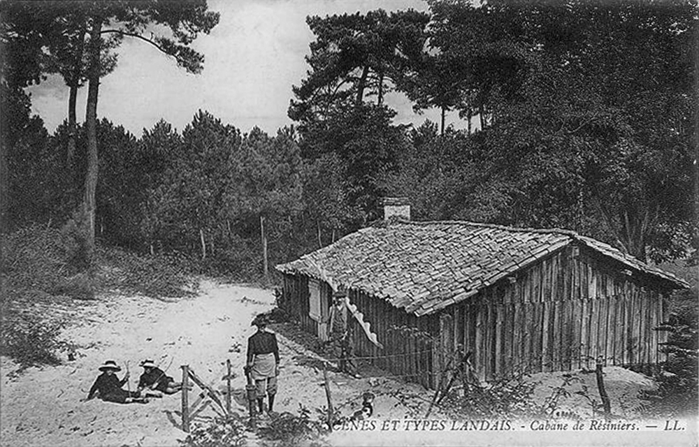 Landes - Cabane de résiniers - Scènes et types landais.